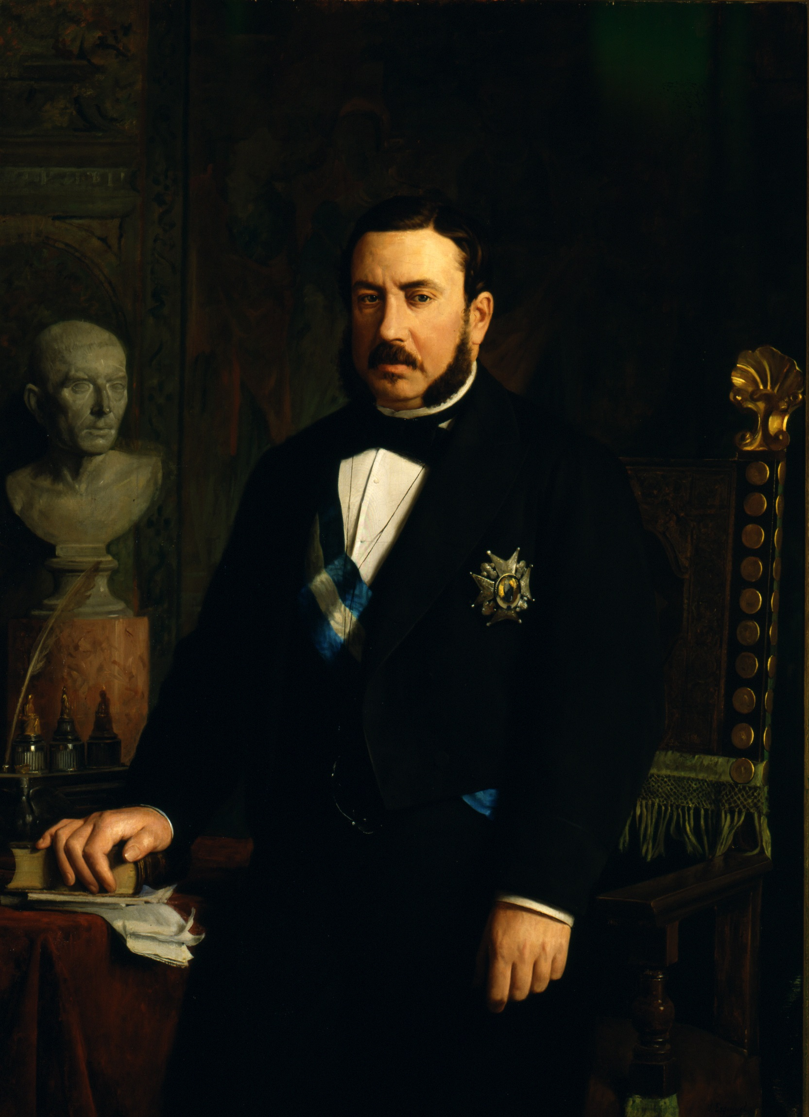 Retrato del politico español Luis José Sartorius (1820-1871), que llegó a ser presidente del Consejo de Ministros durante el reinado de Isabel II de España.